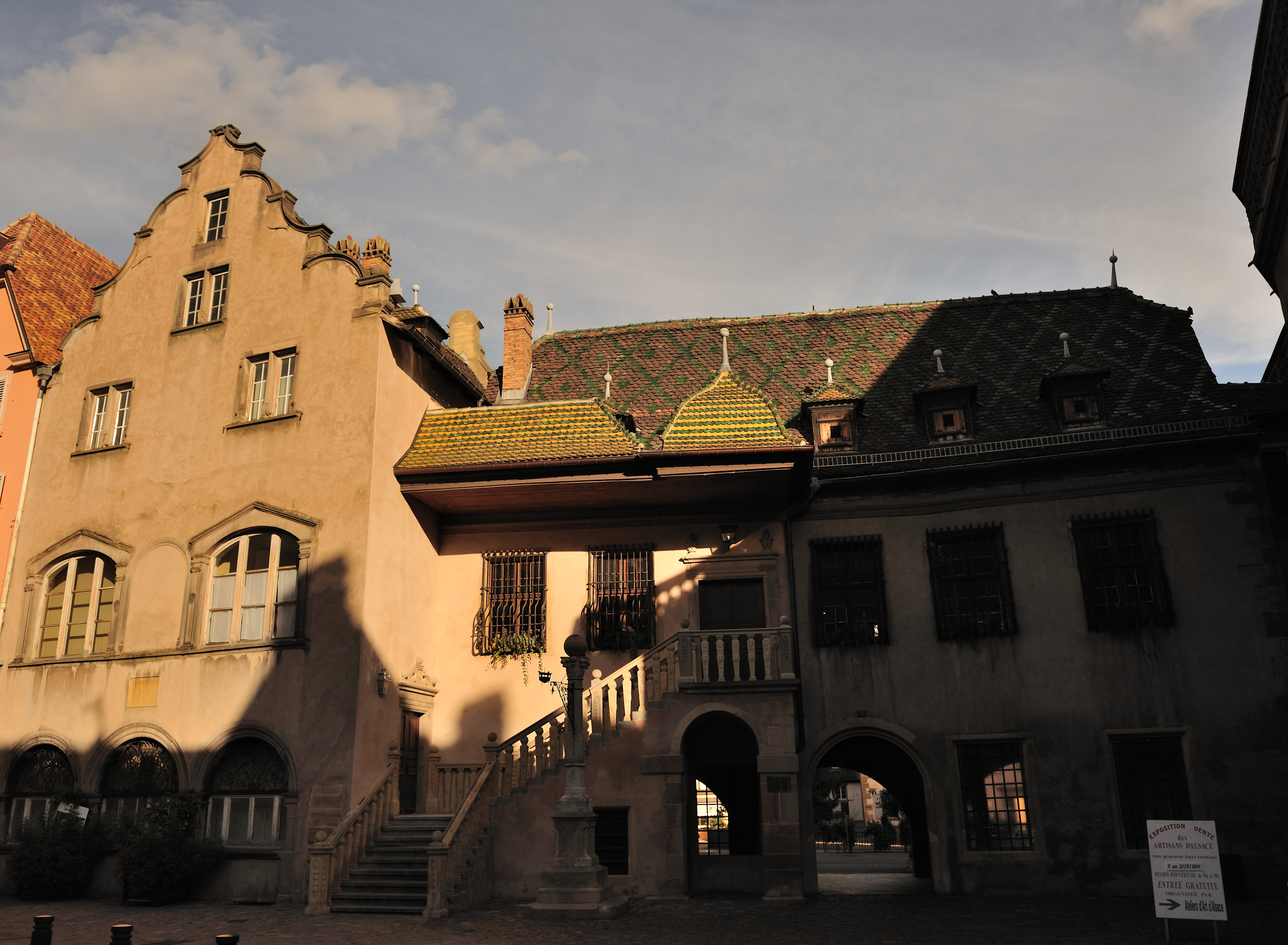 Escalier de l'ancienne douane. Façade coté rue des Marchand. .